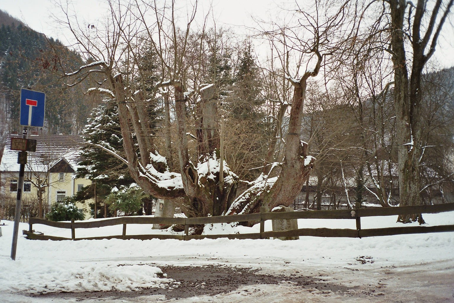 Die 1000-Jährige Priorlinde in Hagen-Priorei